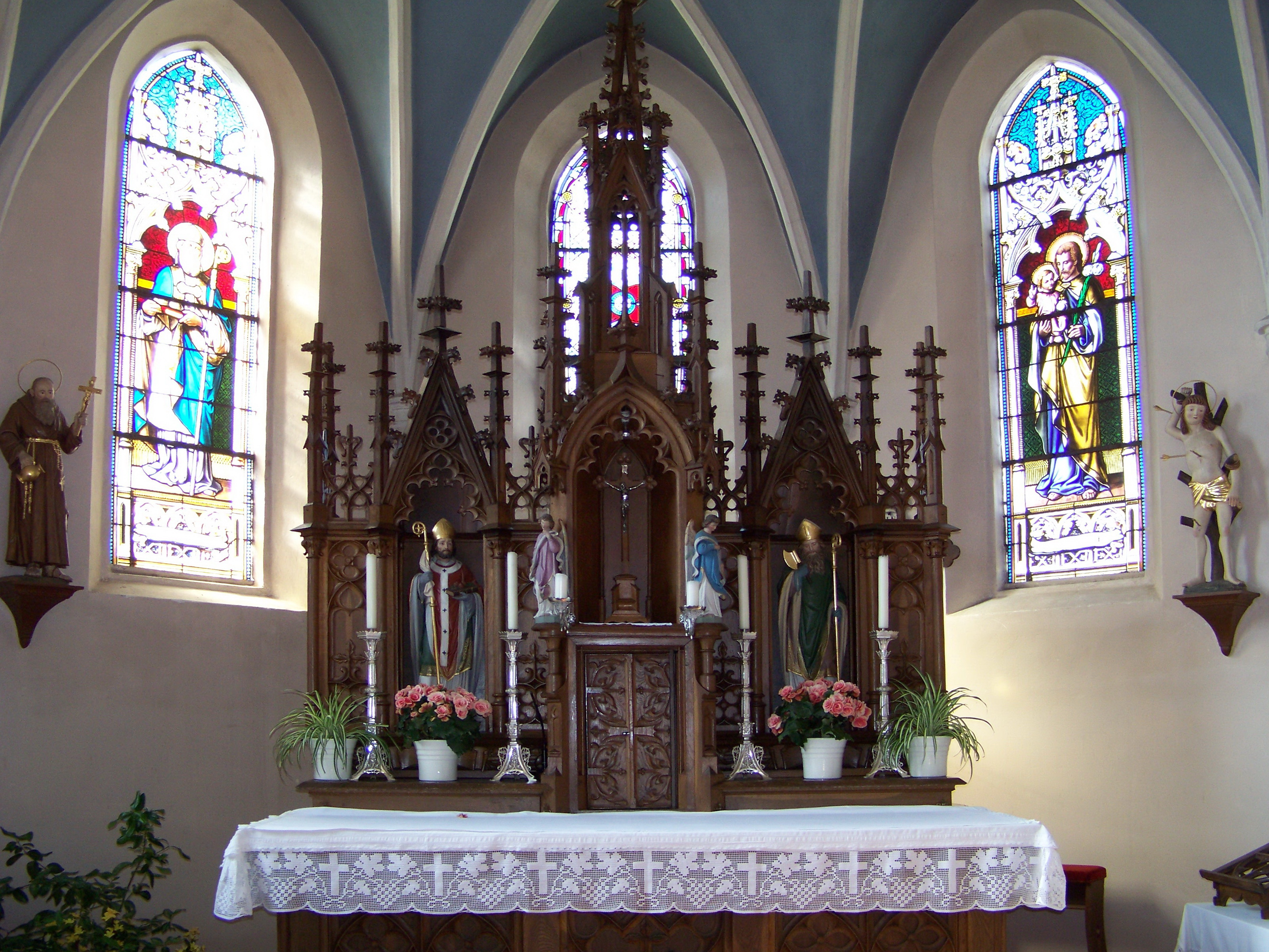 Laberweinting, Franken 13, katholische Expositurkirche St. Nikolaus. Neugotischer Altar mit den Figuren St. Nikolaus und St. Bonifatius.